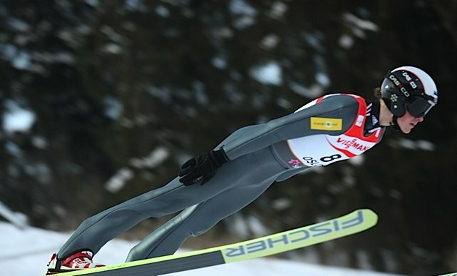 Siim-Tanel Sammelselg podczas serii treningowej przed konkursem indywidualnym mężczyzn na Mistrzostwach Świata w Narciarstwie Klasycznym 2011 w Oslo.